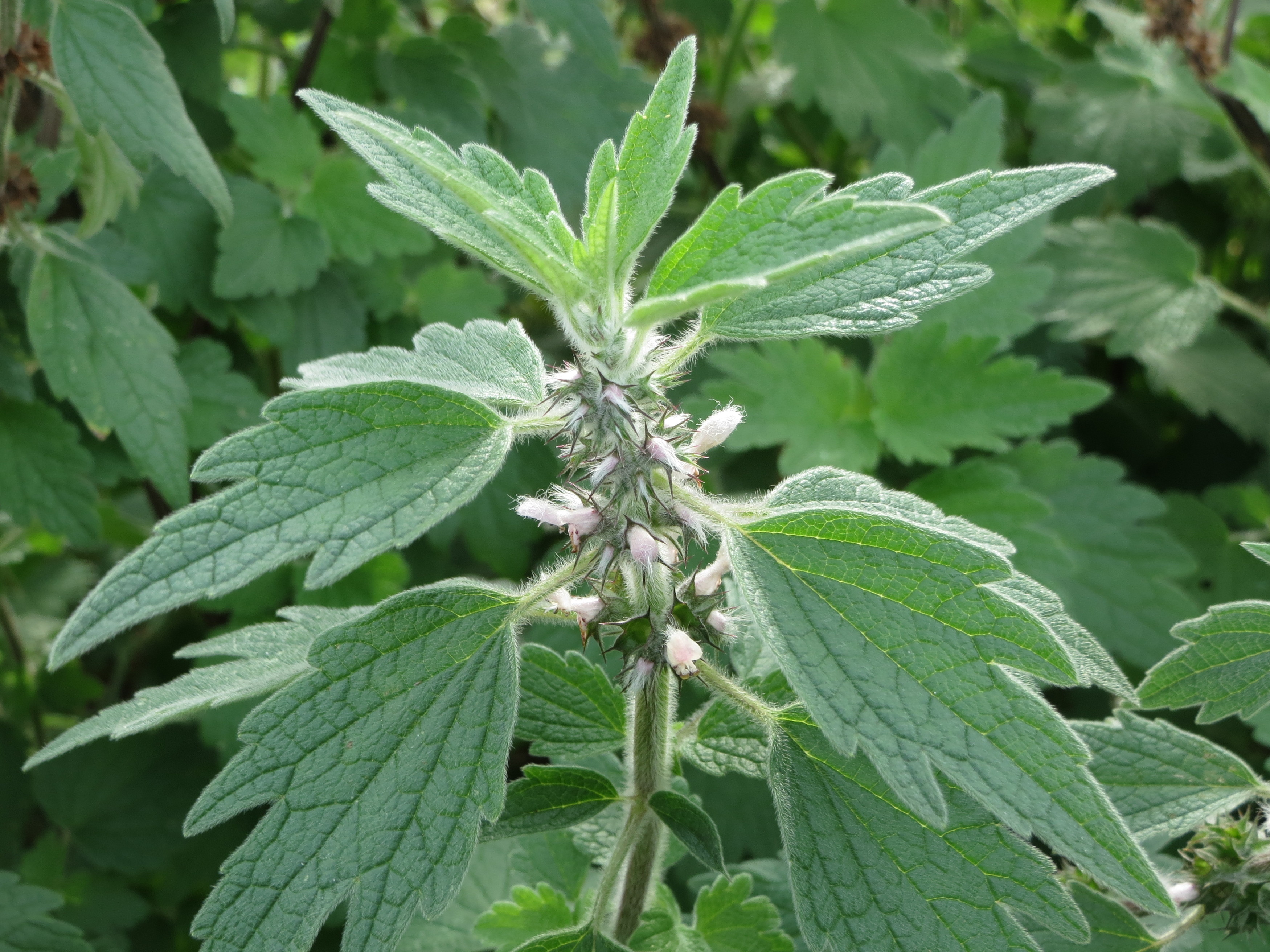 Echtes Herzgespann (Leonurus cardiaca) bei St. Leon-Rot